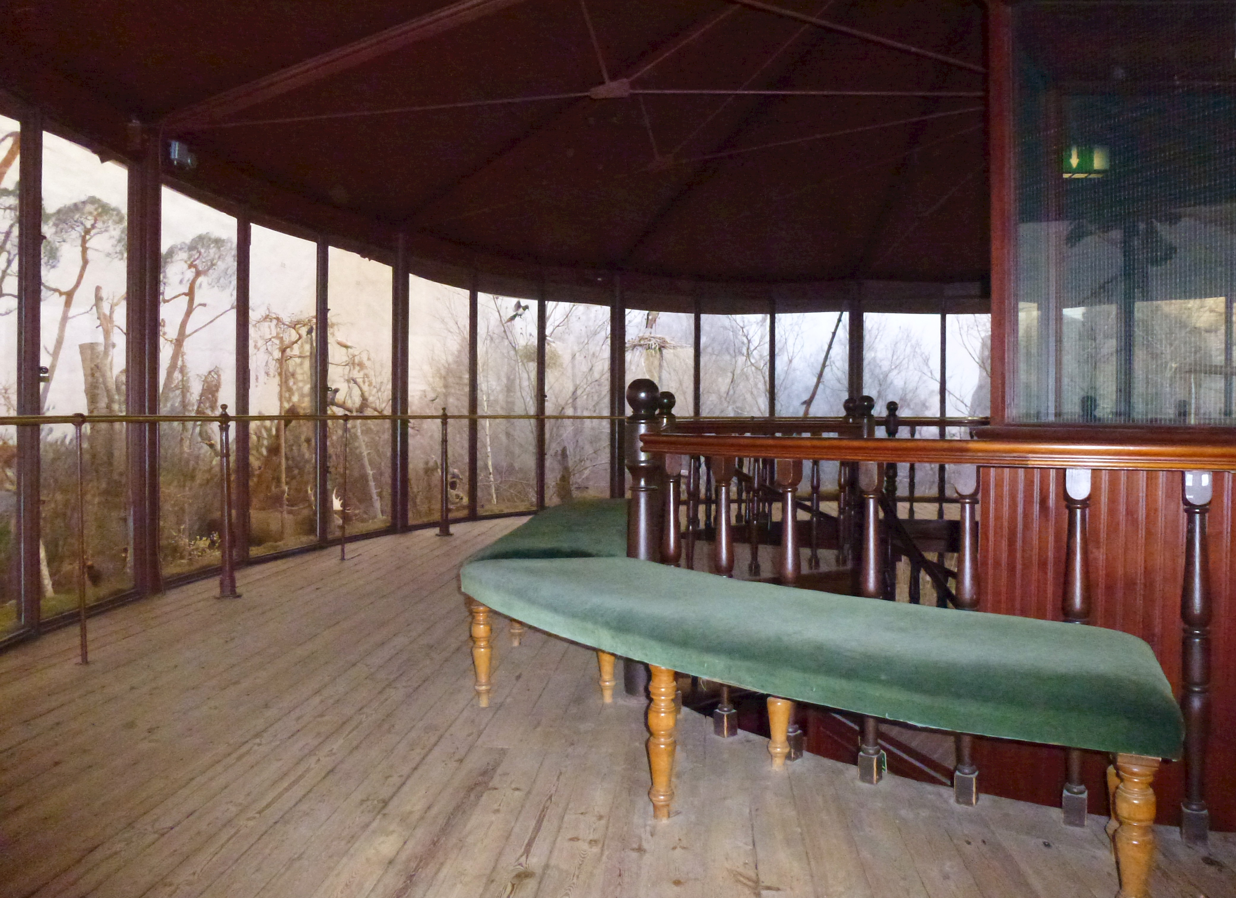 Biologiska museet interiör